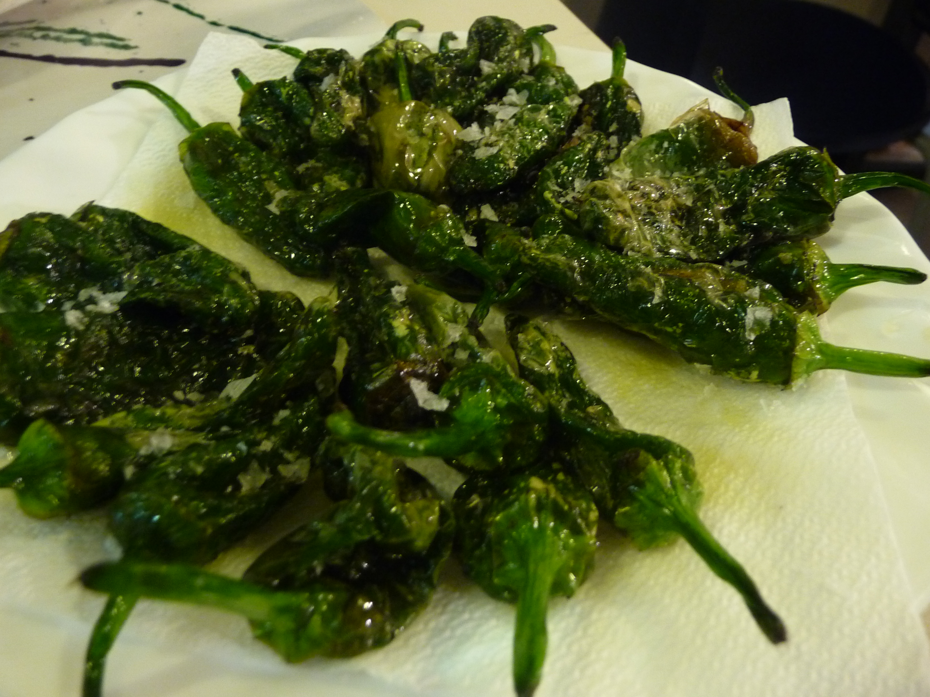 Template:Pimientos de padrón. Bar-marisquería Funicular, en Poble Sec (Barcelona).